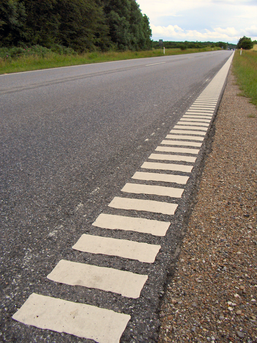 Rumlestriber på primærrute 6 i DK